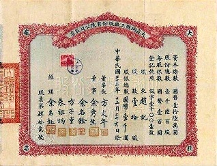 中文（中国大陆）: 桕墅方方家投资创办的1934年大鑫钢铁厂股票